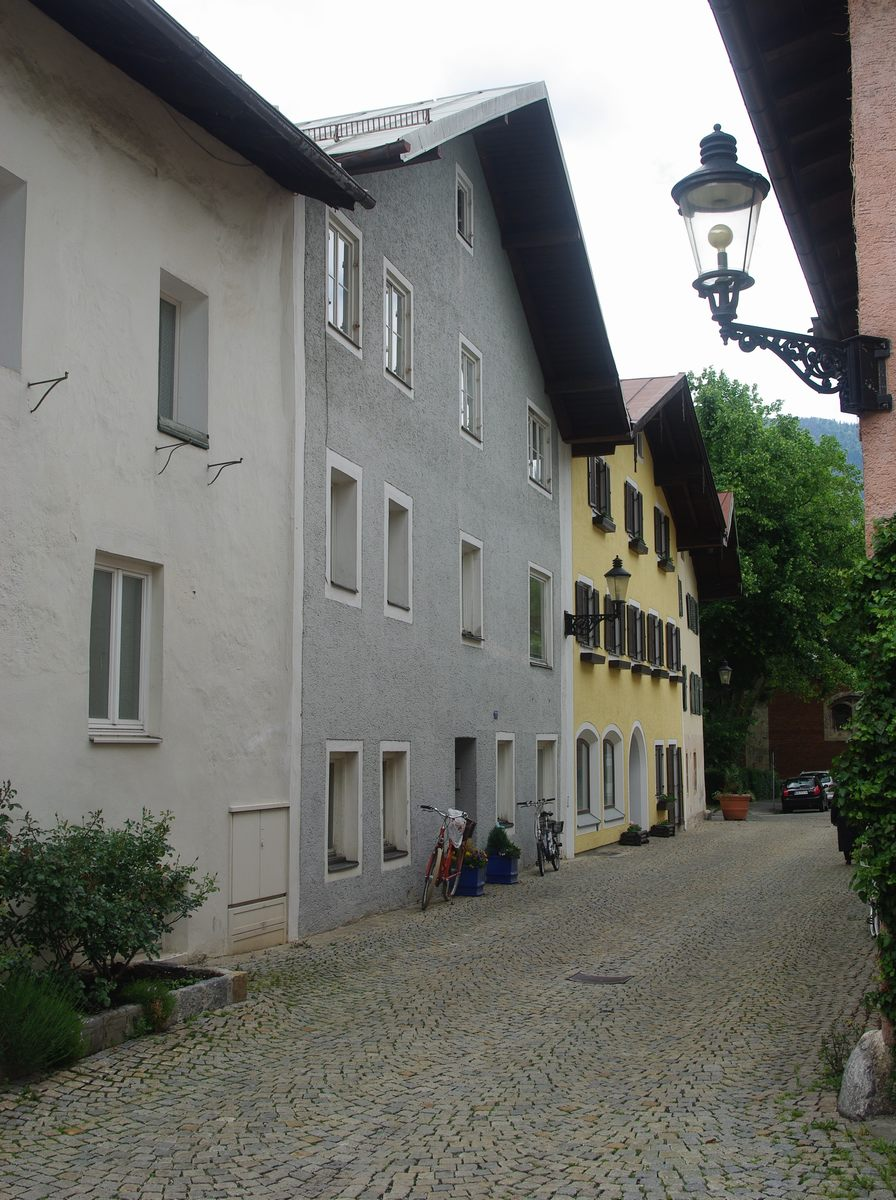 Haus Florianiplatz 6 (links 8, rechts 4) in 83435 Bad Reichenhall